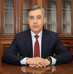 министр обороны РК